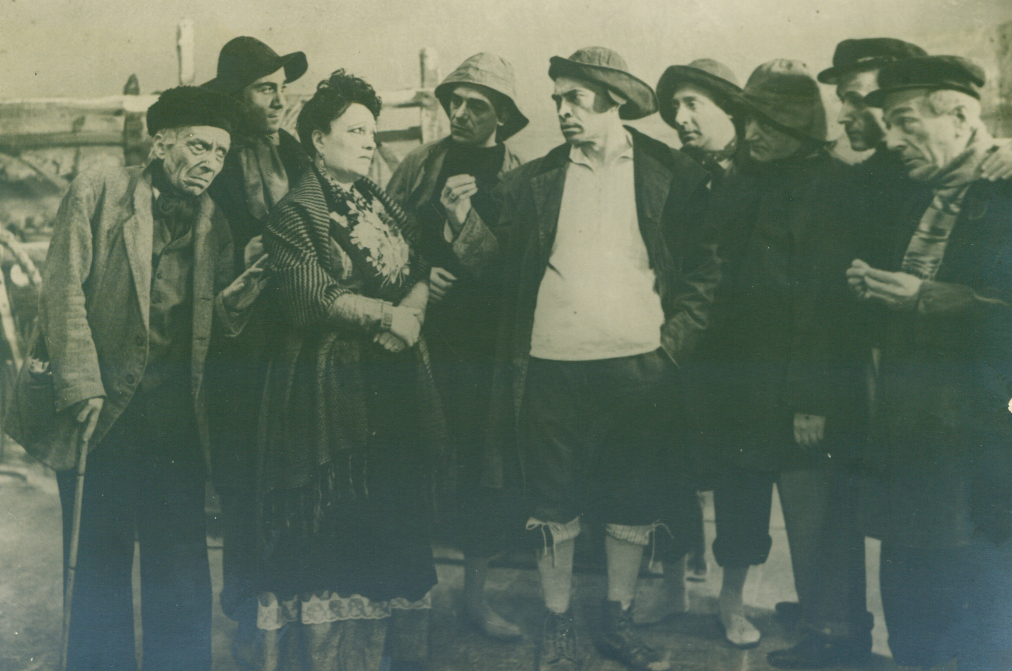 foto di scena di Raffaele Viviani di mia proprietà in una scena di Pescatori, al centro Luisella Viviani e sulla destra Vincenzo Scarpetta